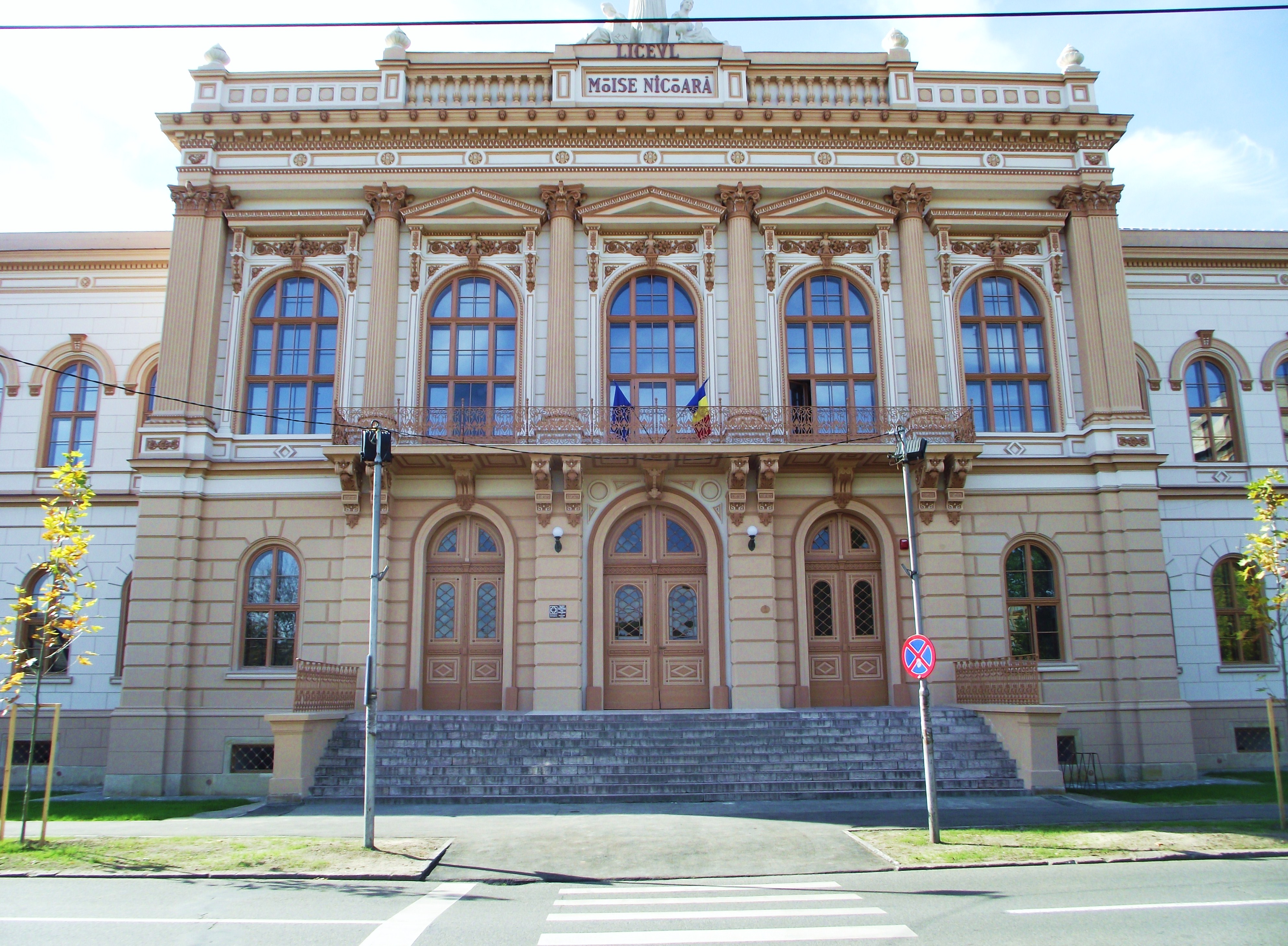 Fațada Colegiului Național "Moise Nicoară" din Arad.